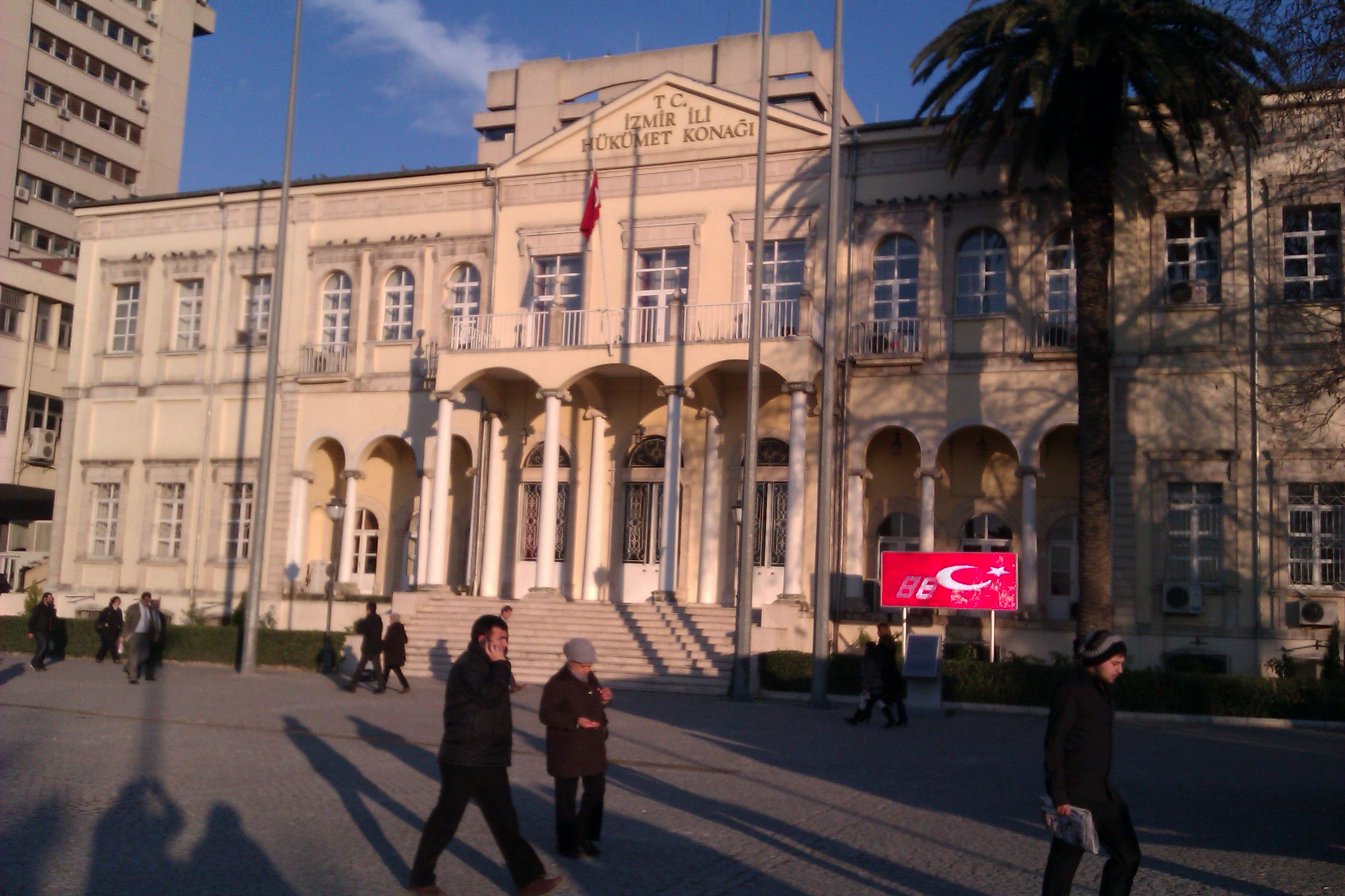 Konak, İzmir